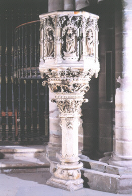 Pulpito plateresco.